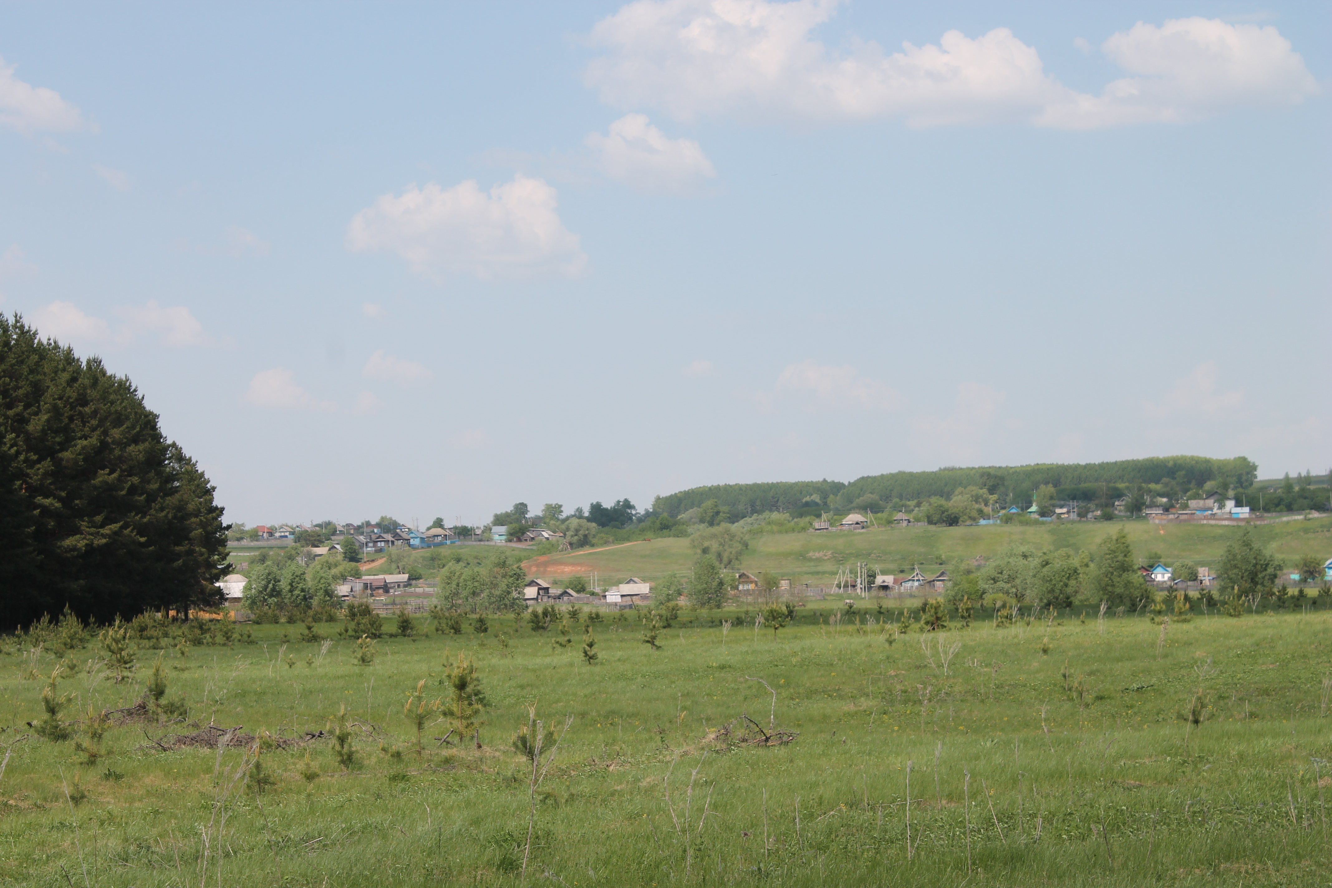 Вид деревни Кугарчино (Башкортостан) Калтасинский район